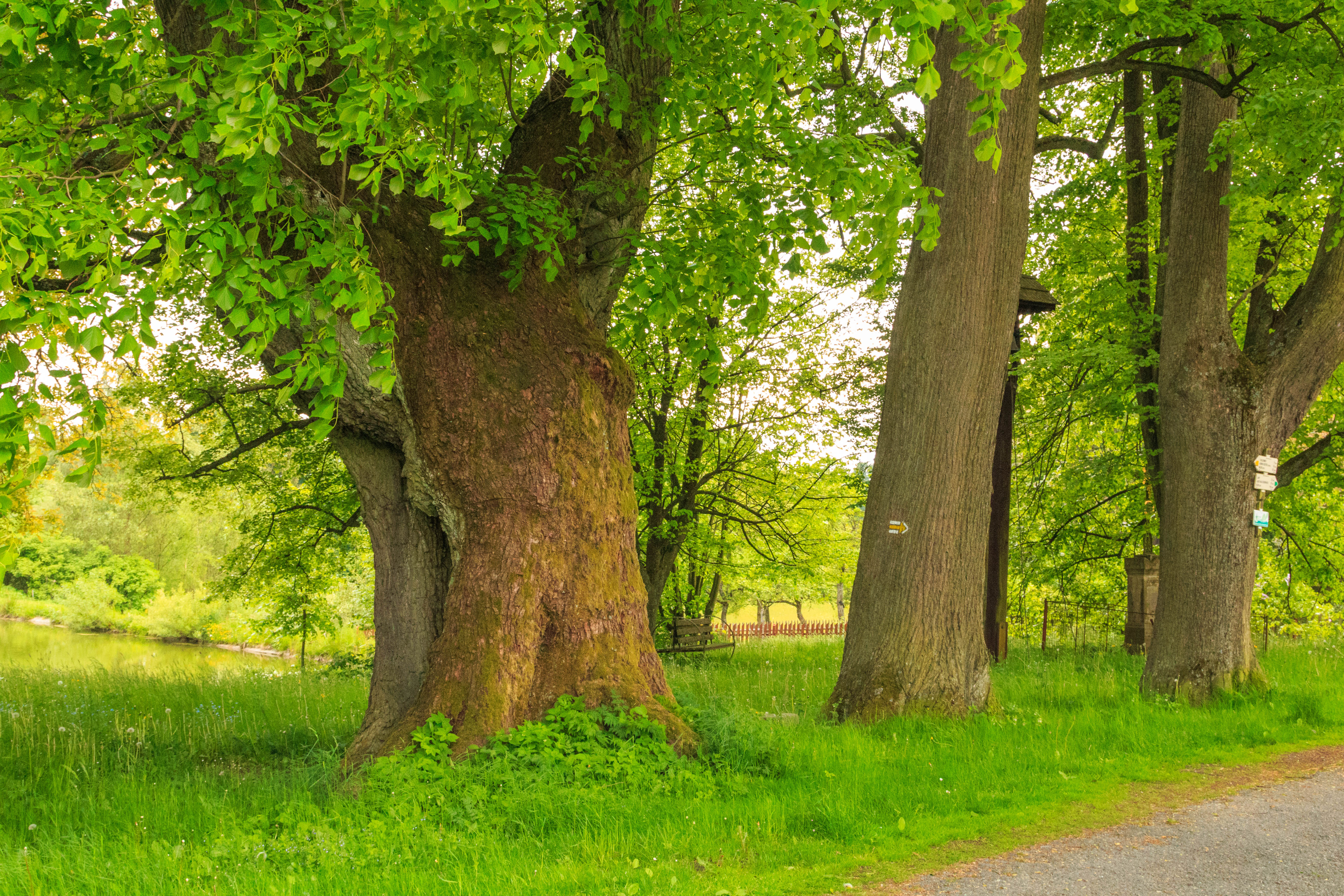 Spálavská lípa Project: Chráněná území.